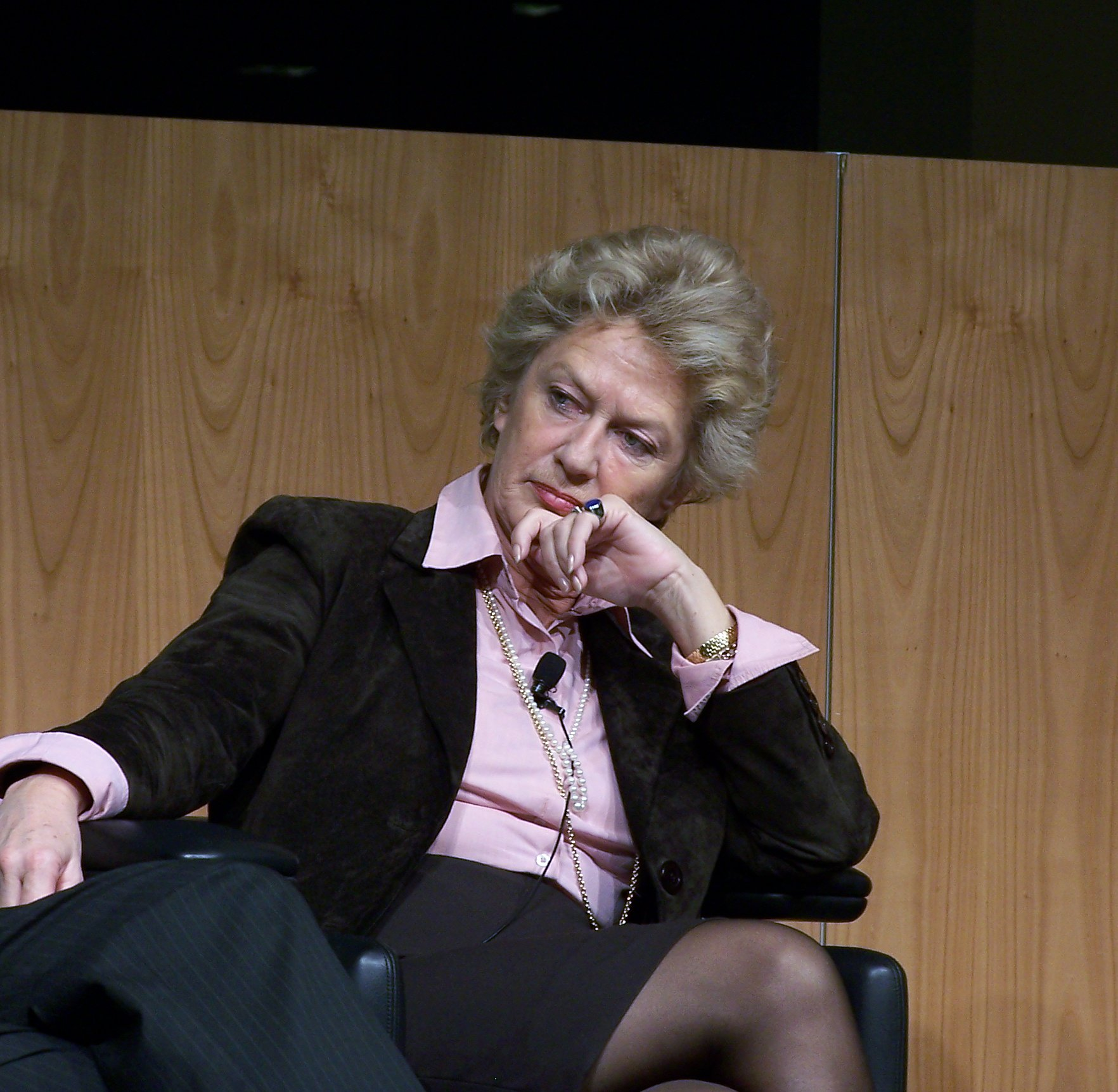 Oberbürgermeisterin Petra Roth (CDU) bei einer Podiumsdiskussion der Frankfurter Rundschau in der Schalterhalle der Frankfurter Sparkasse (Filiale Neue Mainzer Straße).